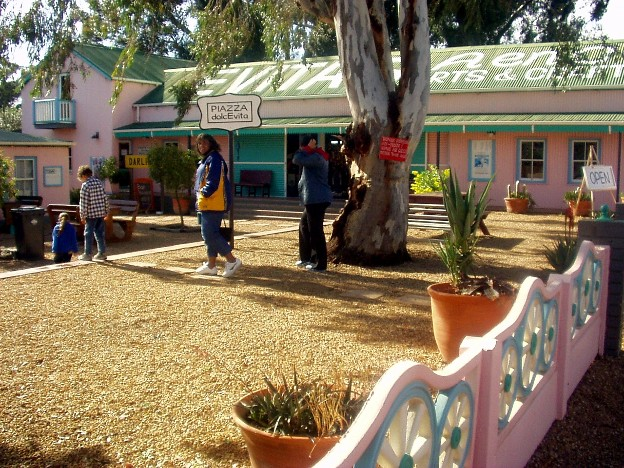 Evita se Perron art and crafts shop in Darling.